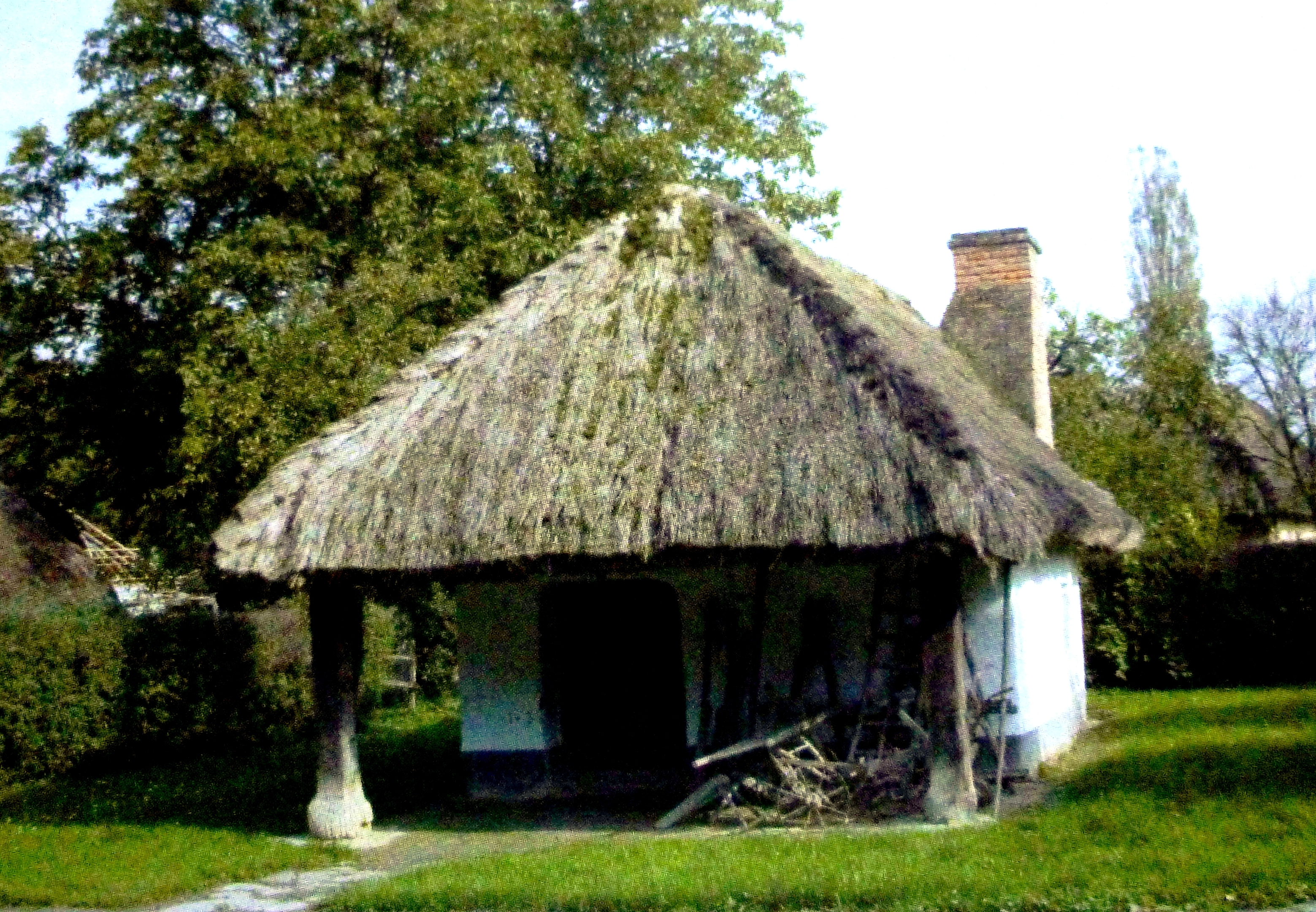 Göcseji Falumúzeum: hottói kovácsműhely